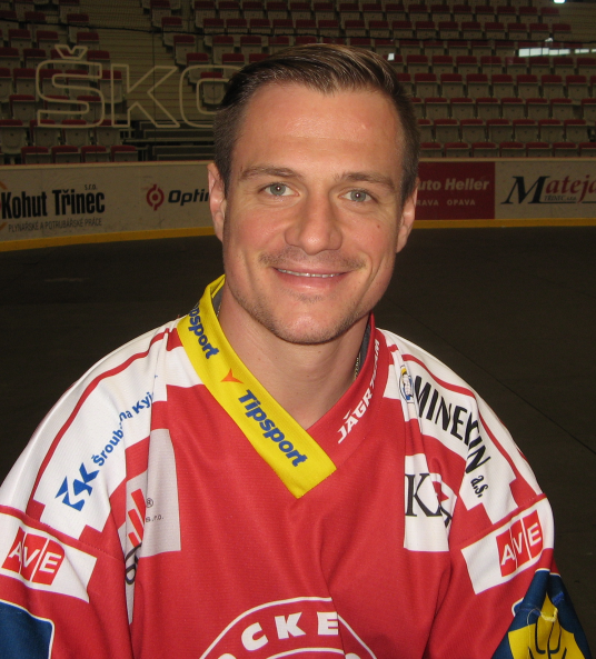 Po zakončení sezóny 2014/15 ve Werk Areně